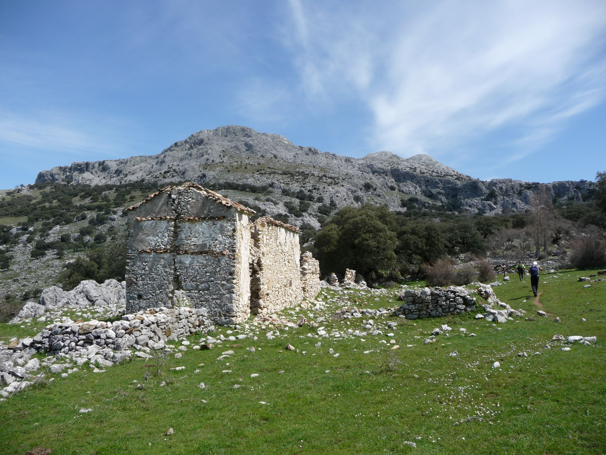 Casa del Dornajo - Parque Natural Sierra de Grazalema (Andalucía, España)